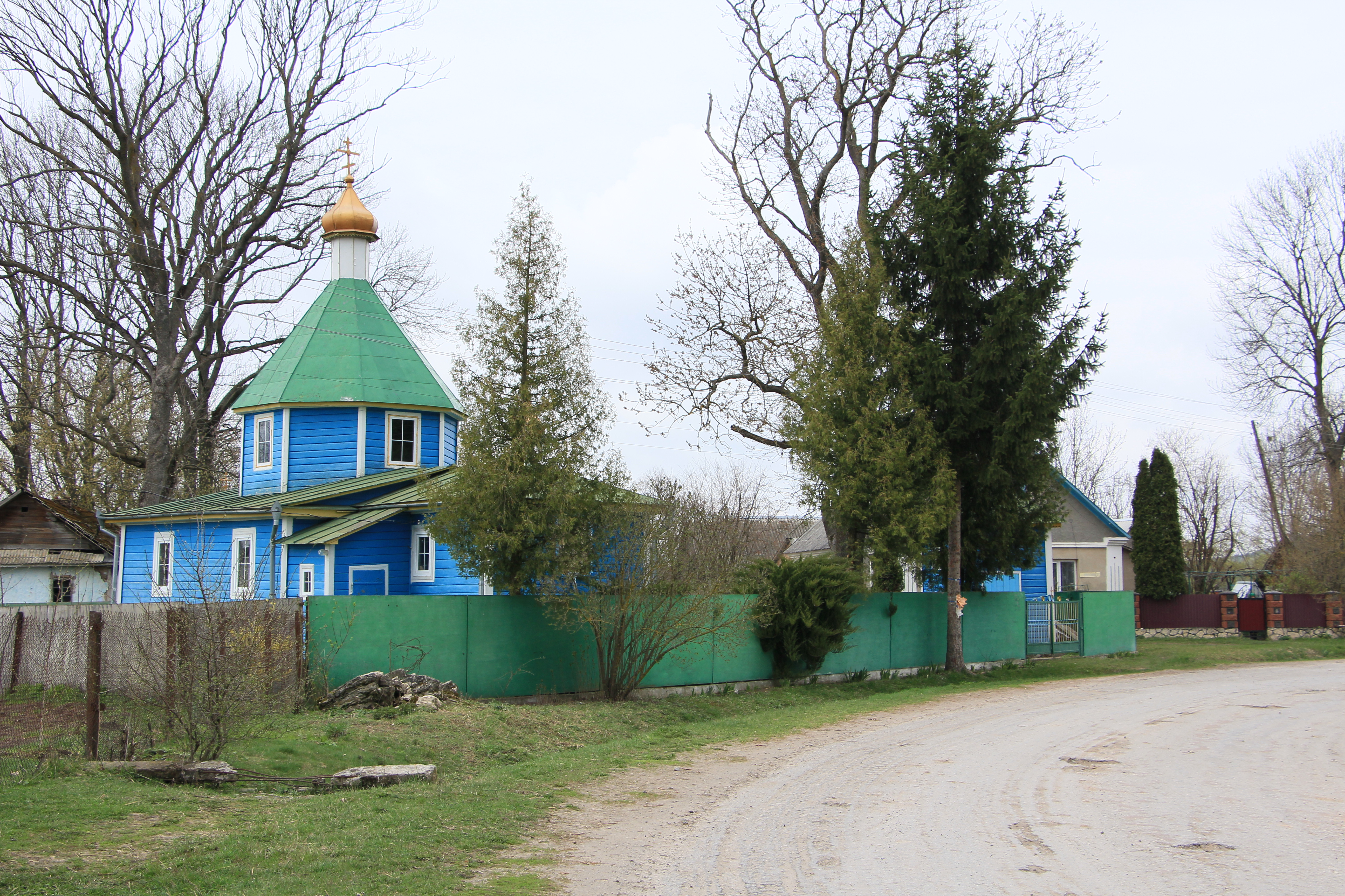 Дерев'яна церква в селі Двірець Кременецького району, Тернопільської області